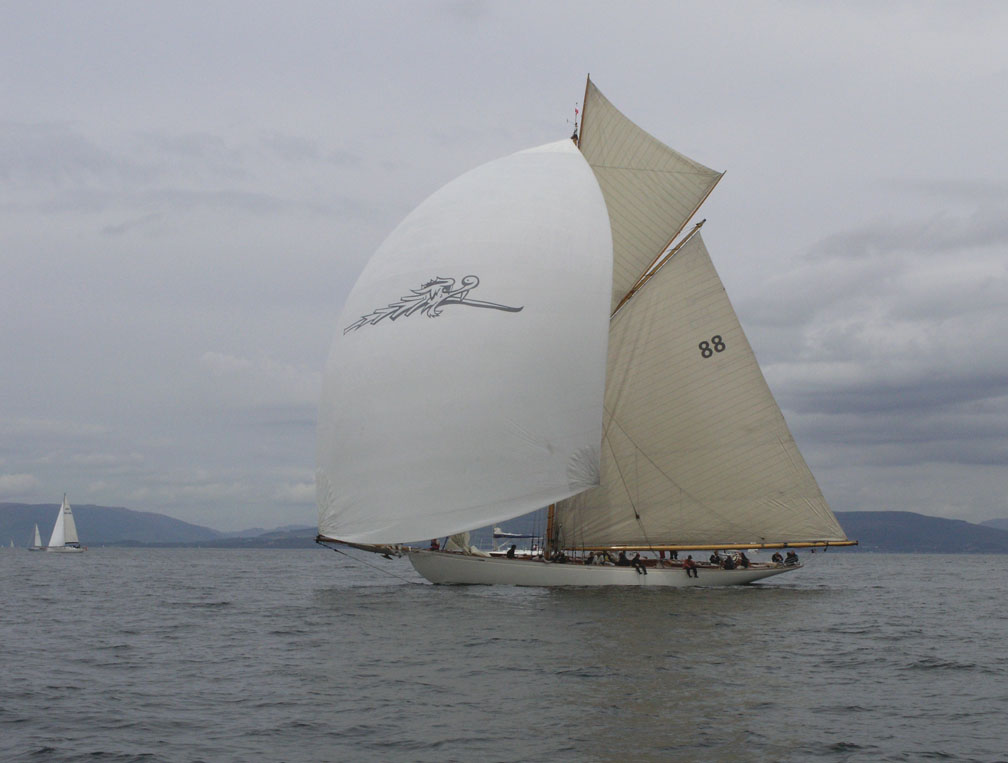 Moonbeam lll